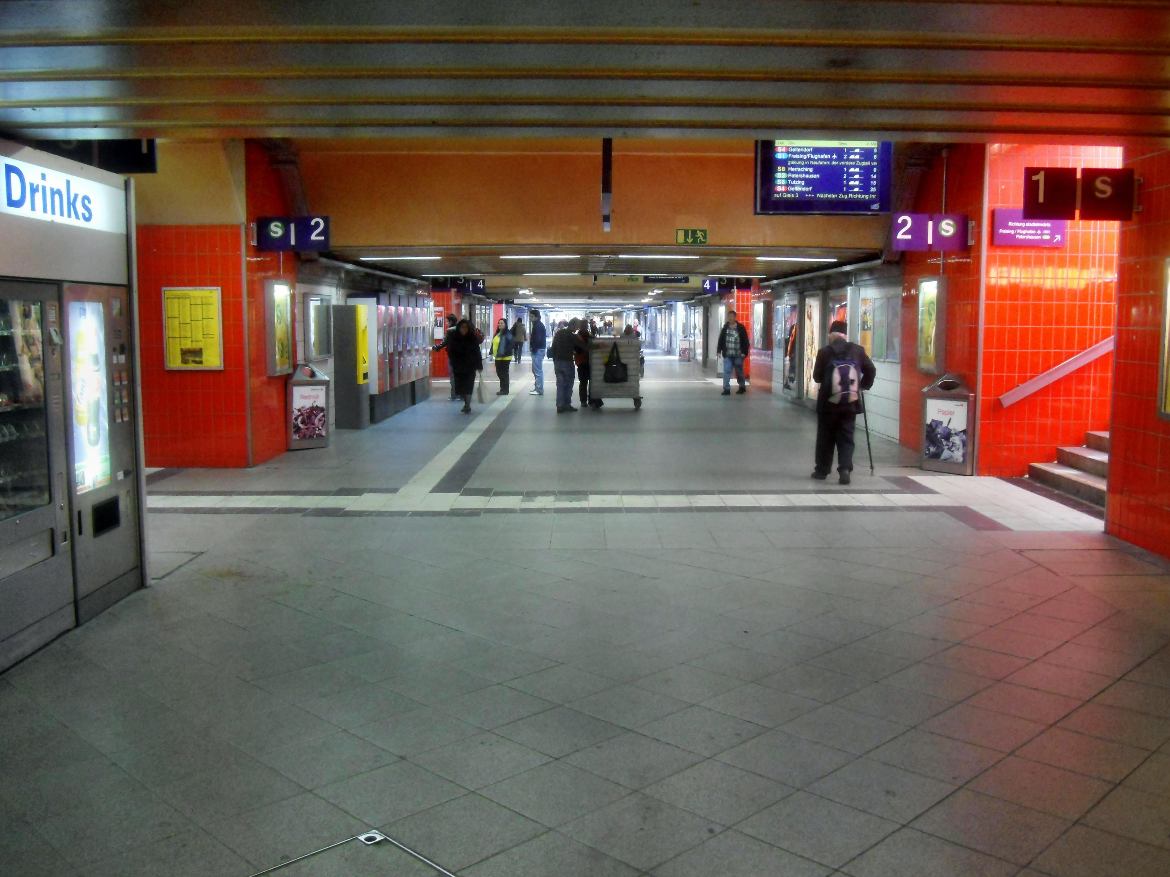 Unterführung des Bahnhofs München Ost in München in Bayern (Deutschland) von Gleis 1 Richtung Gleis 14 blickend